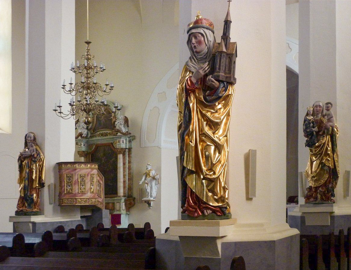 Wnętrze kościoła św. Anny. Widoczne figury (od lewej) Madonny z Dzieciątkiem, św. Jadwigi i św. Anny Samotrzeciej.